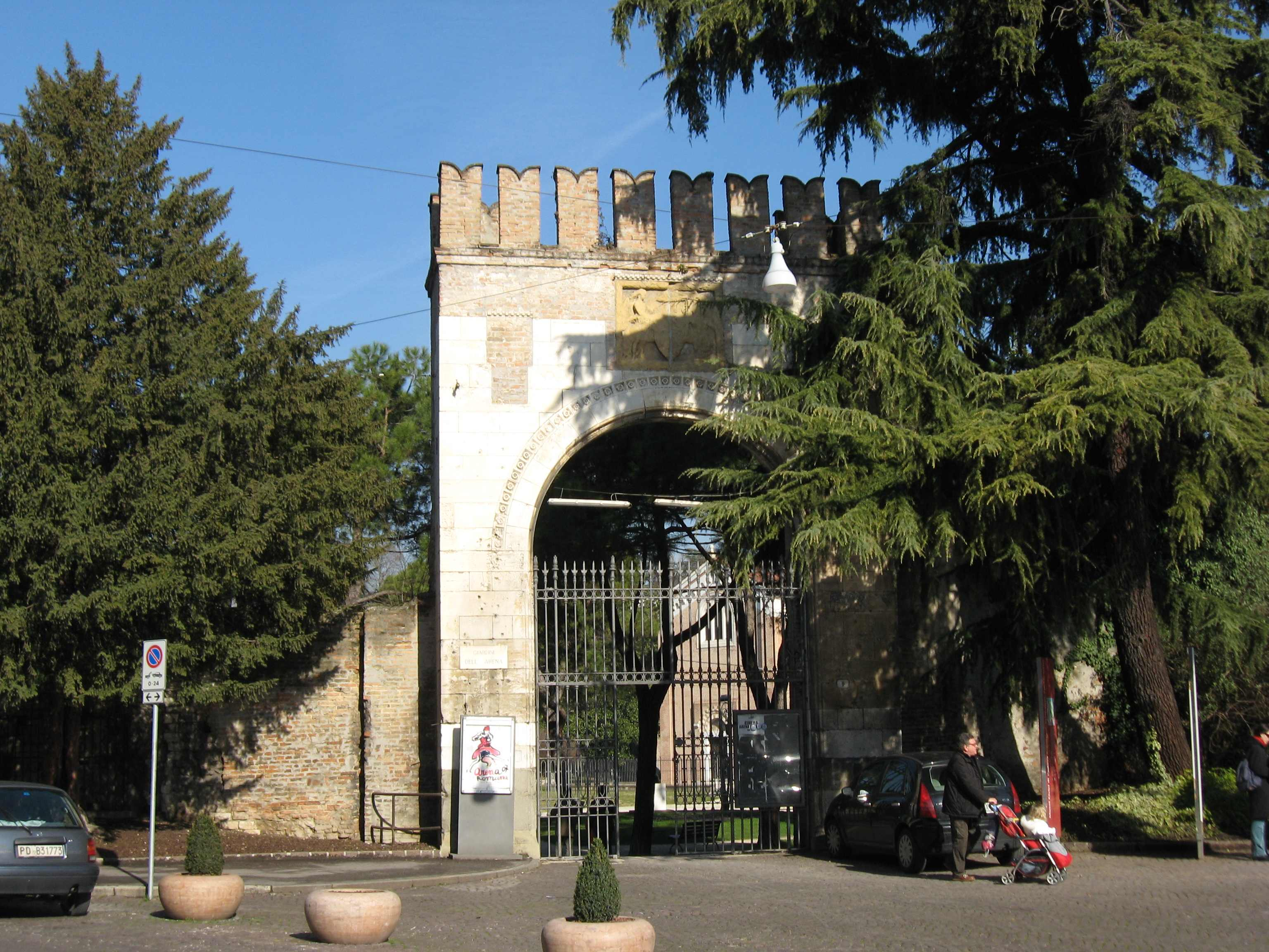 Giardini dell'Arena